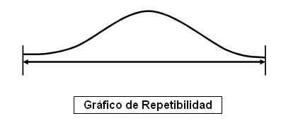 Gráfico de Repetibilidad